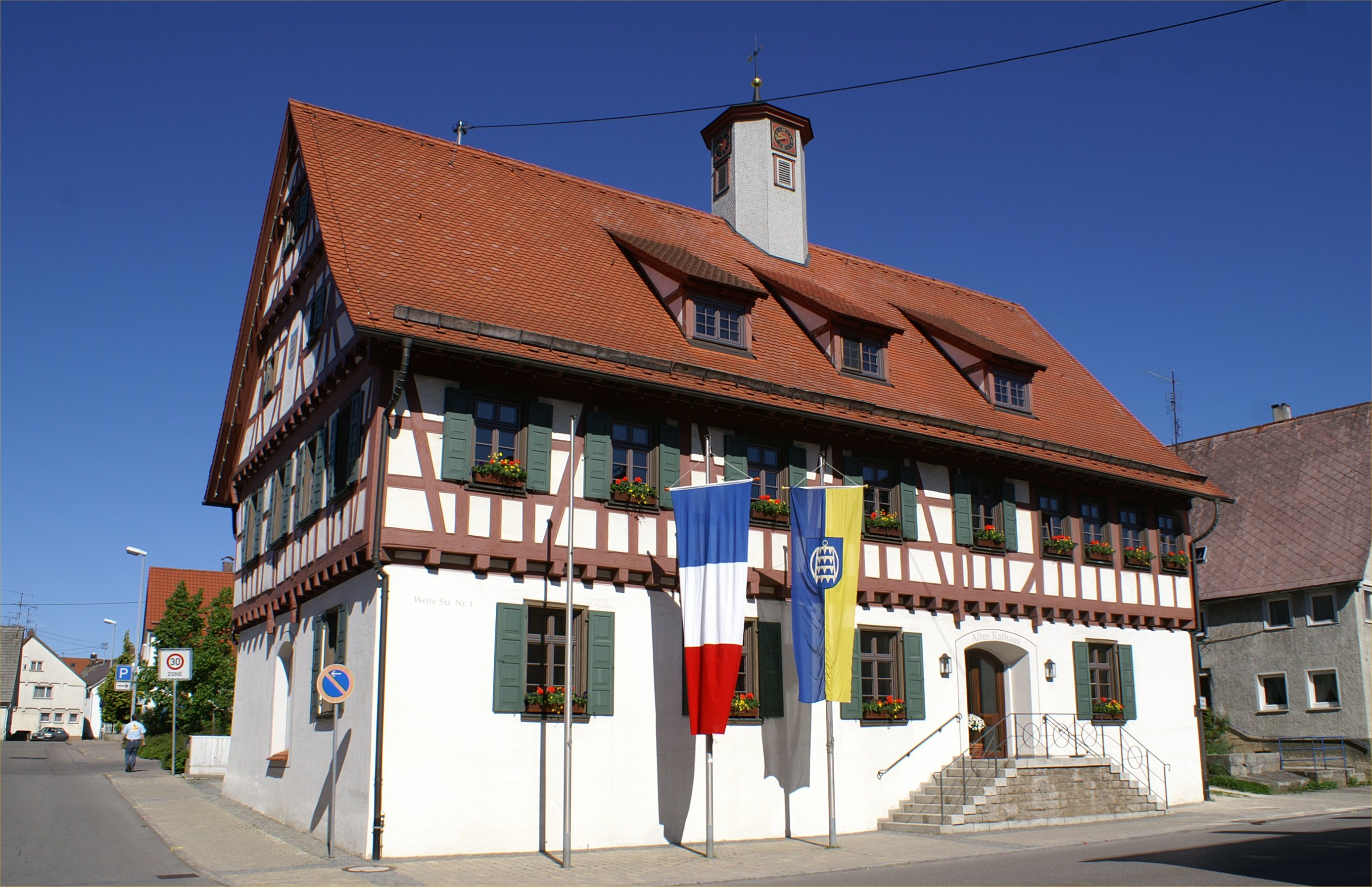 Altes Rathaus in Laichingen im Alb-Donau-Kreis. Beflaggung anlässlich des Besuchs von Gästen aus Ducey in der Normandie.